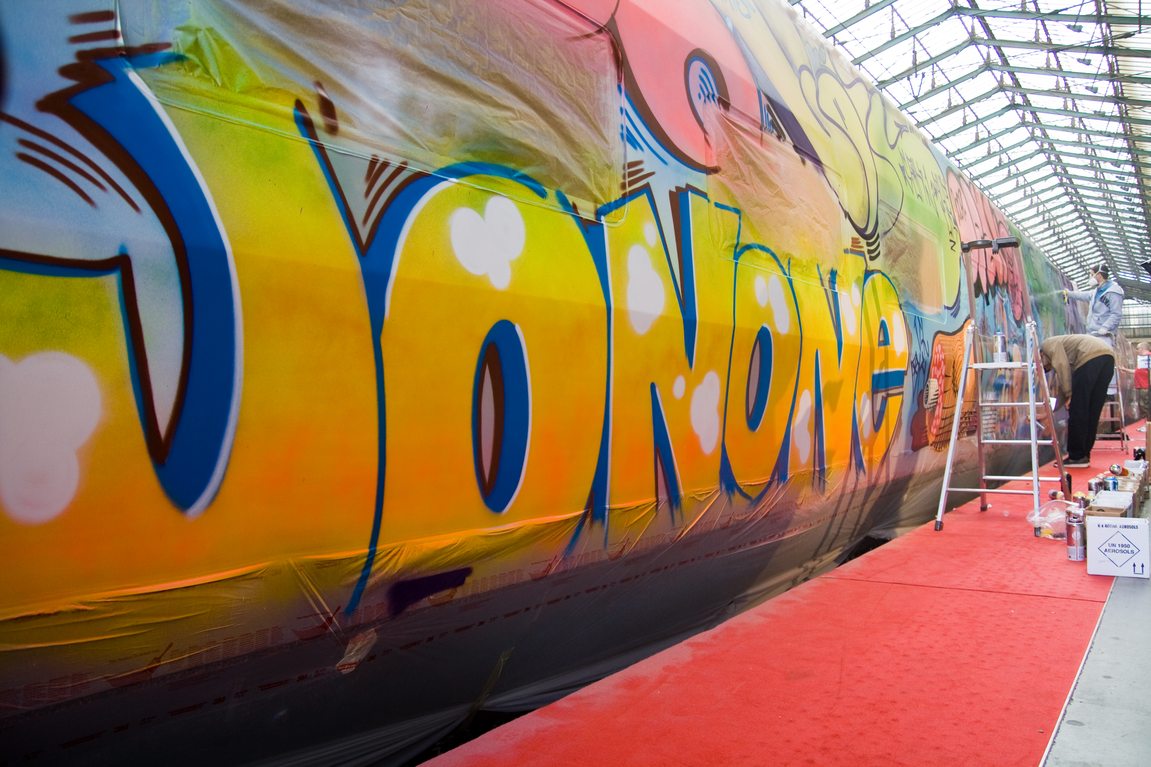 Peinture de Jonone sur un Thalys pour le lancement de la ligne reliant Amsterdam et Cologne